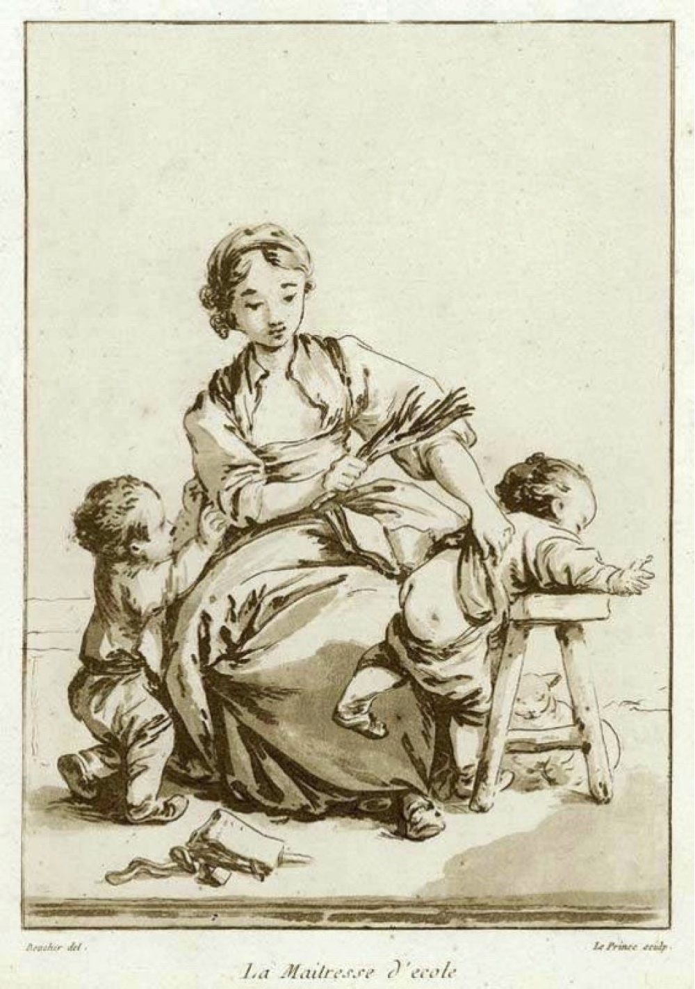 La maîtresse d'école, lavis de bistre, gravure de Jean-Baptiste Le Prince d'après François Boucher